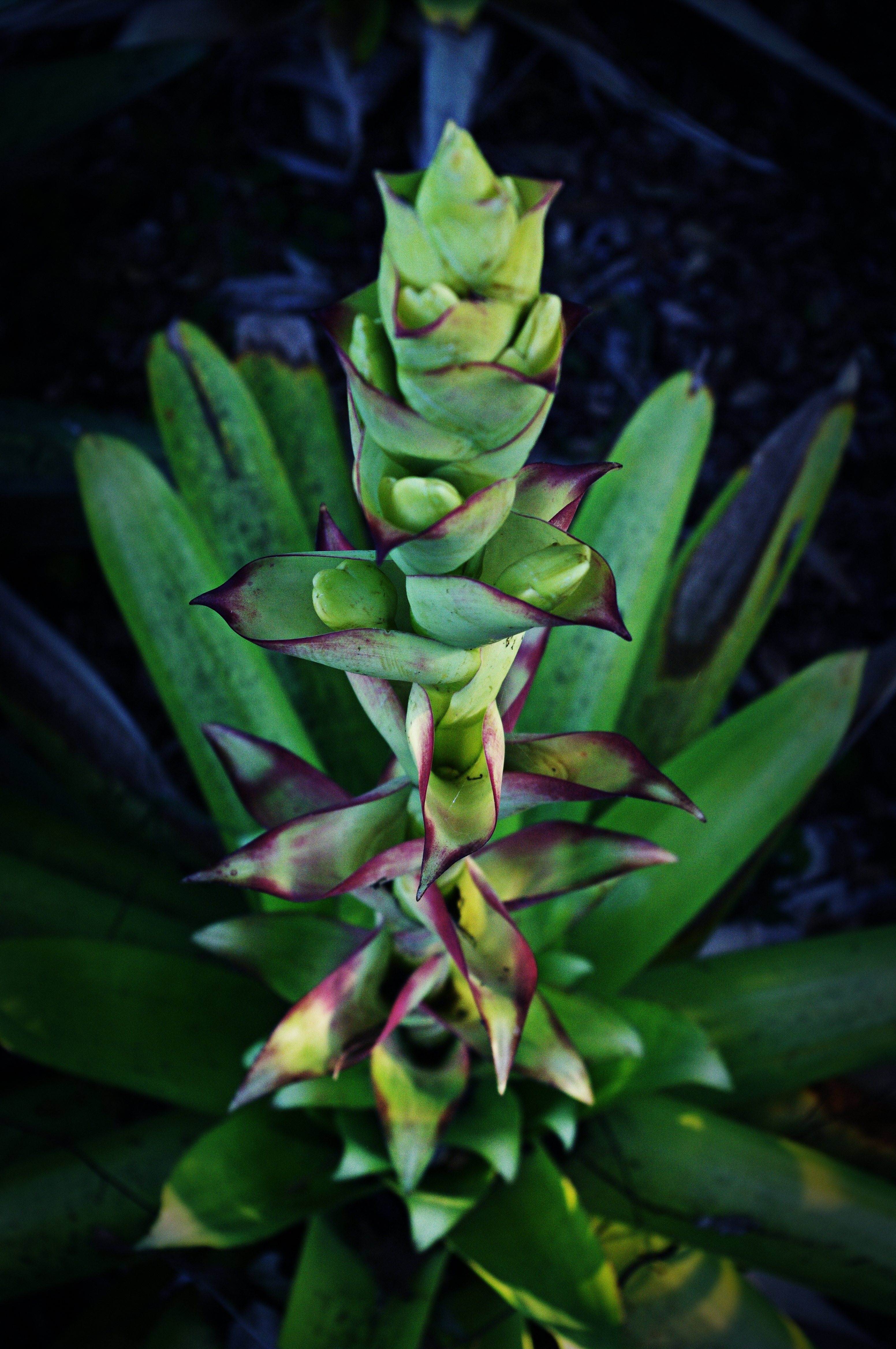 Alcantarea nahoumii flower spike